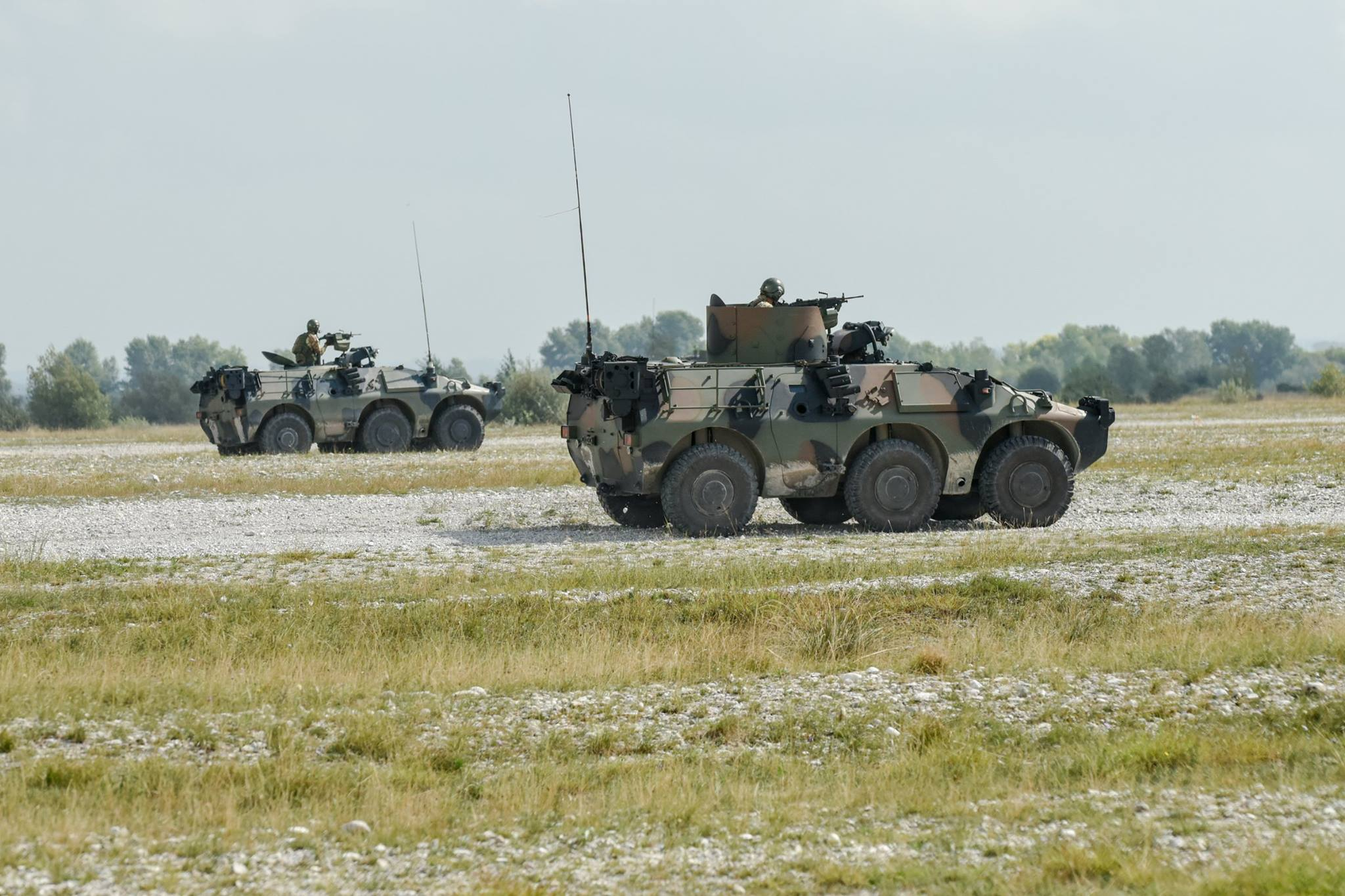 Blindo Puma (6X6) di Piemonte Cavalleria, presso il poligono del Meduna Cellina